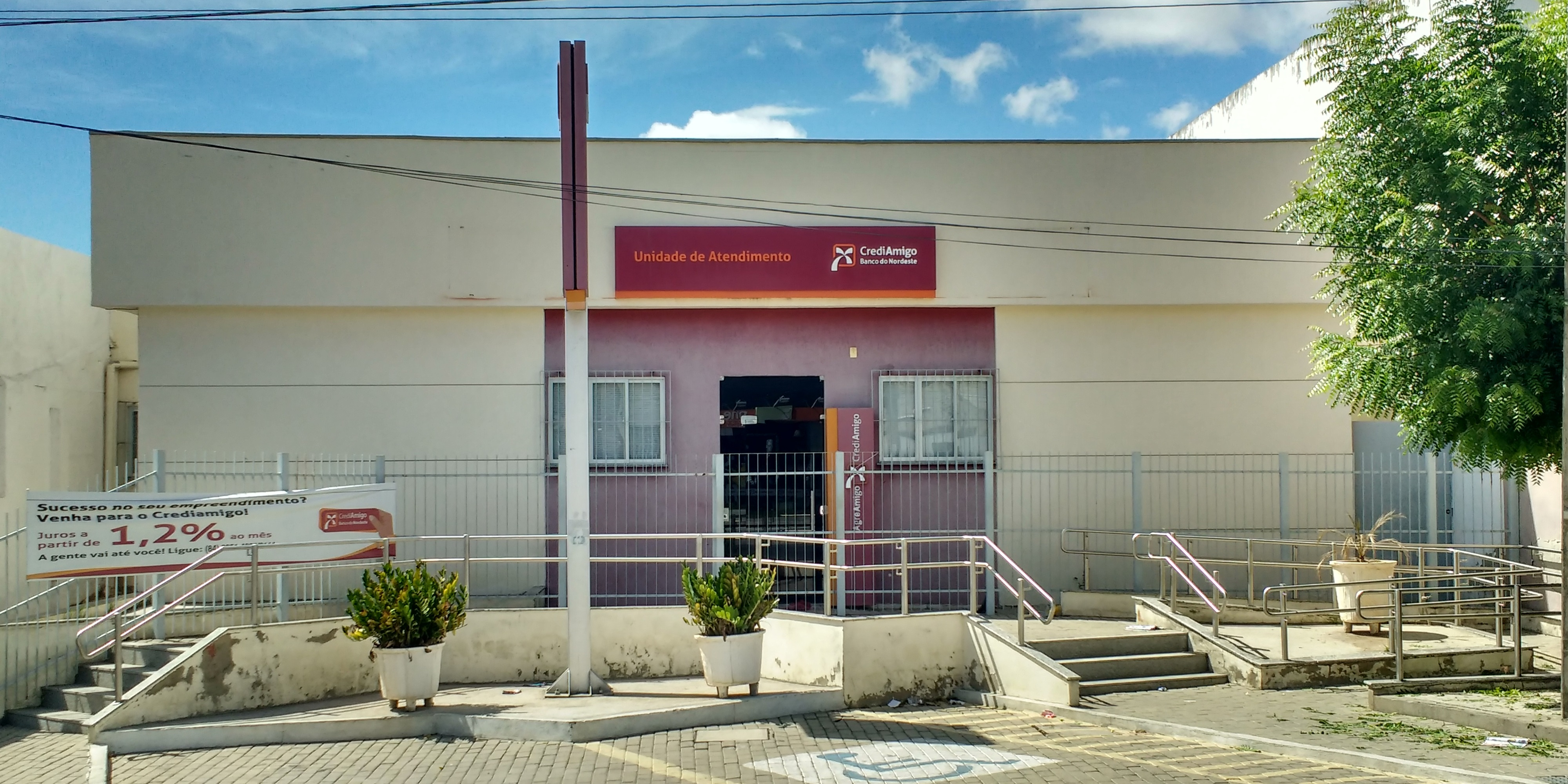 Agência do Banco do Nordeste do Brasil (BNB) na Avenida Independência em Pau dos Ferros, Rio Grande do Norte (Brasil).